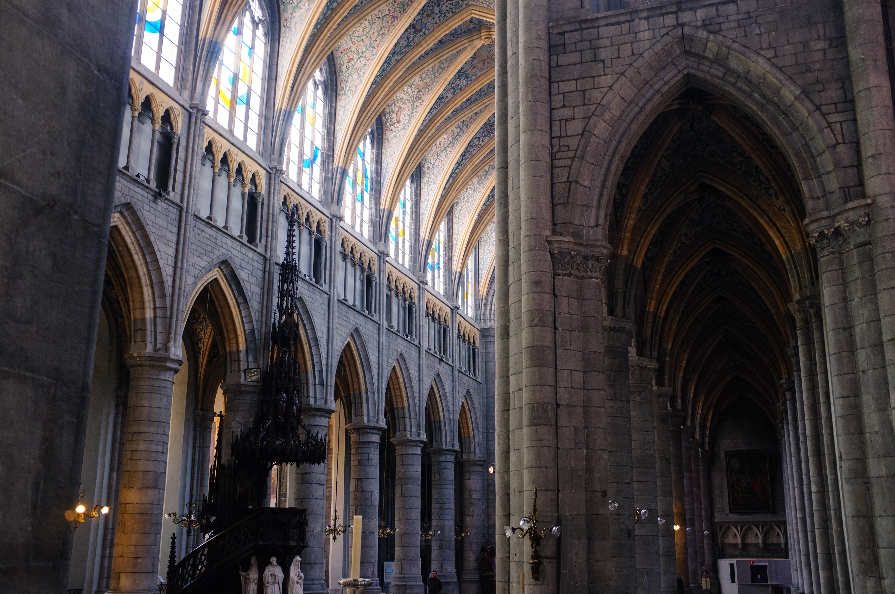 Fujifilm FinePix X100 | 1/125sec, f/2.8, ISO 800